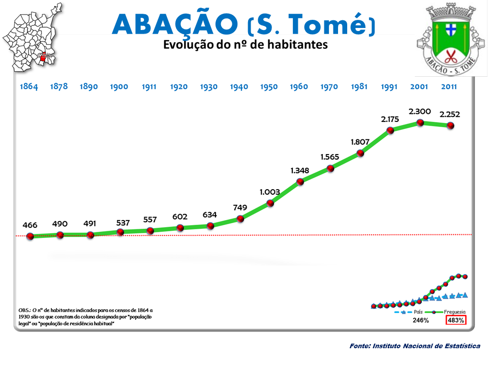 Evolução da População 1864 / 2011